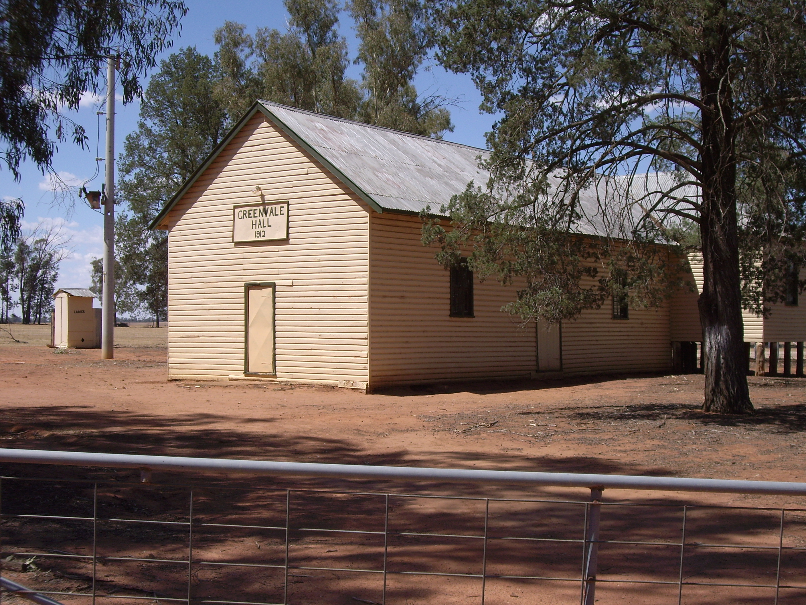 Greenvale Hall